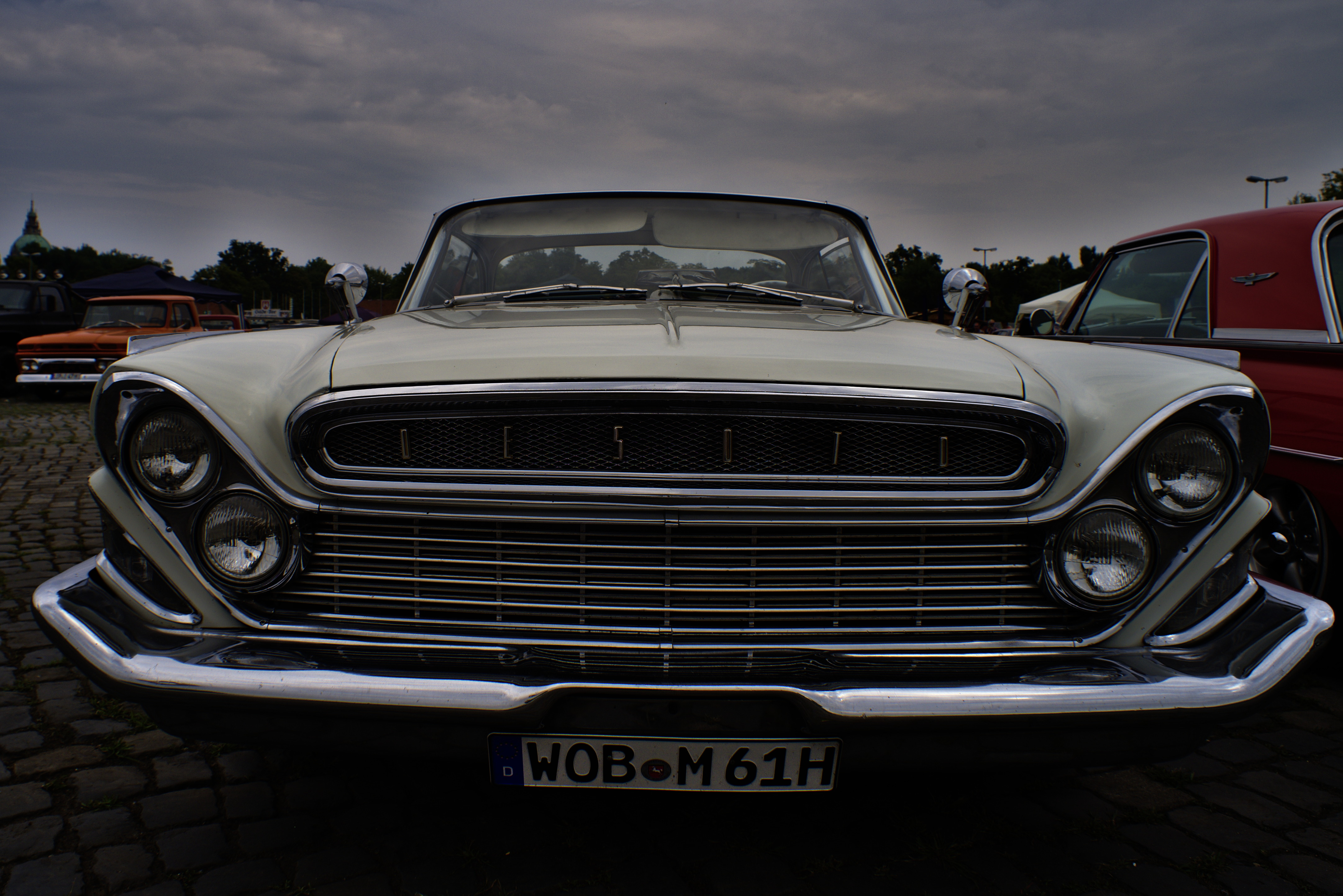 Street Mag Show, Schützenplatz Hannover 2018